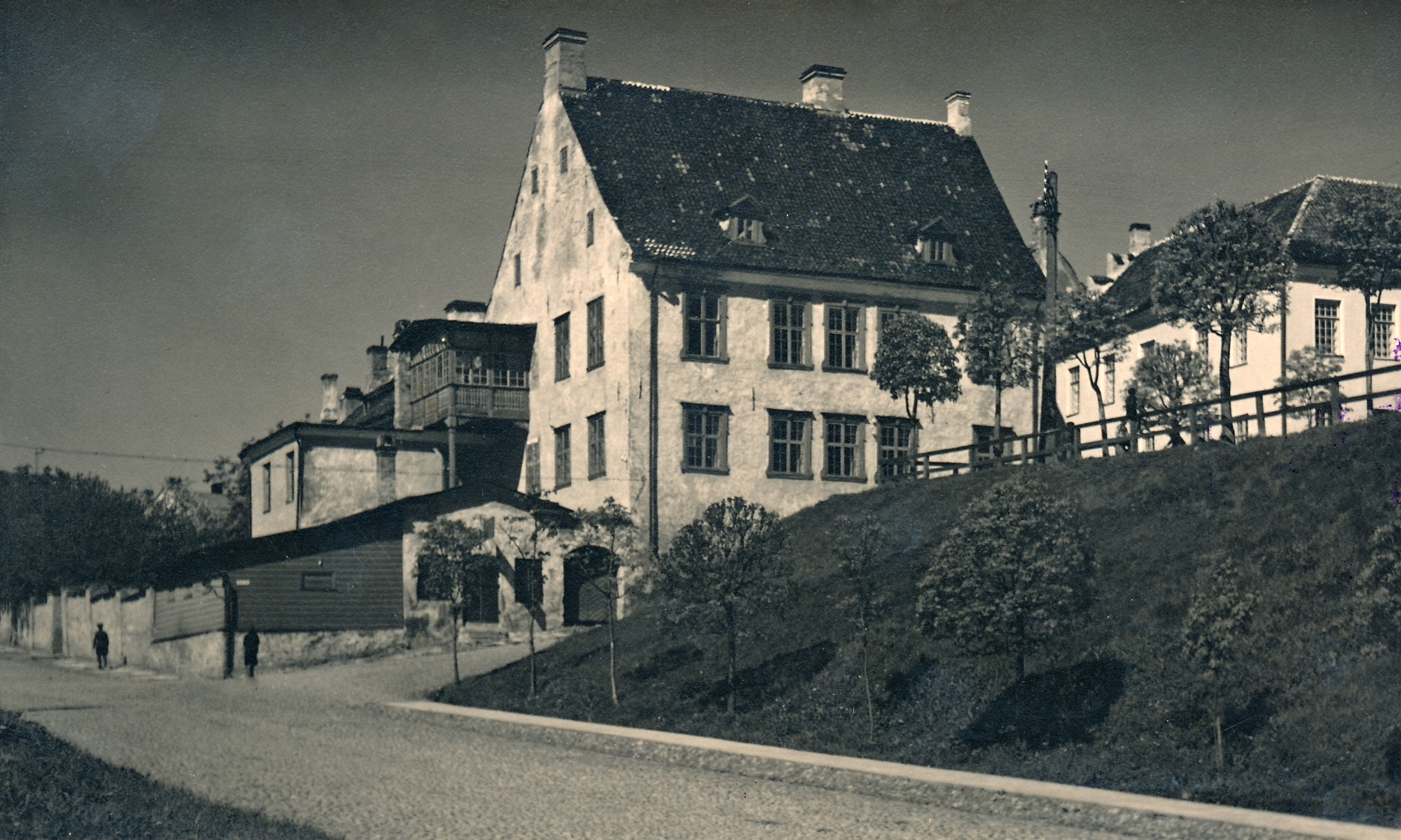 Fonne maja Narvas